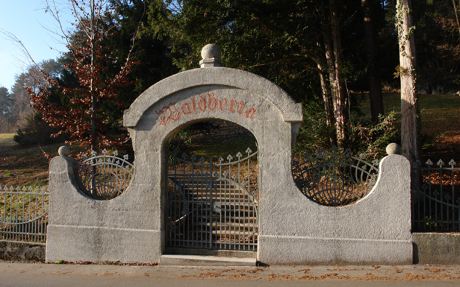 Feldafing: Villa Waldberta, Tor an der Eichgrabenstraße